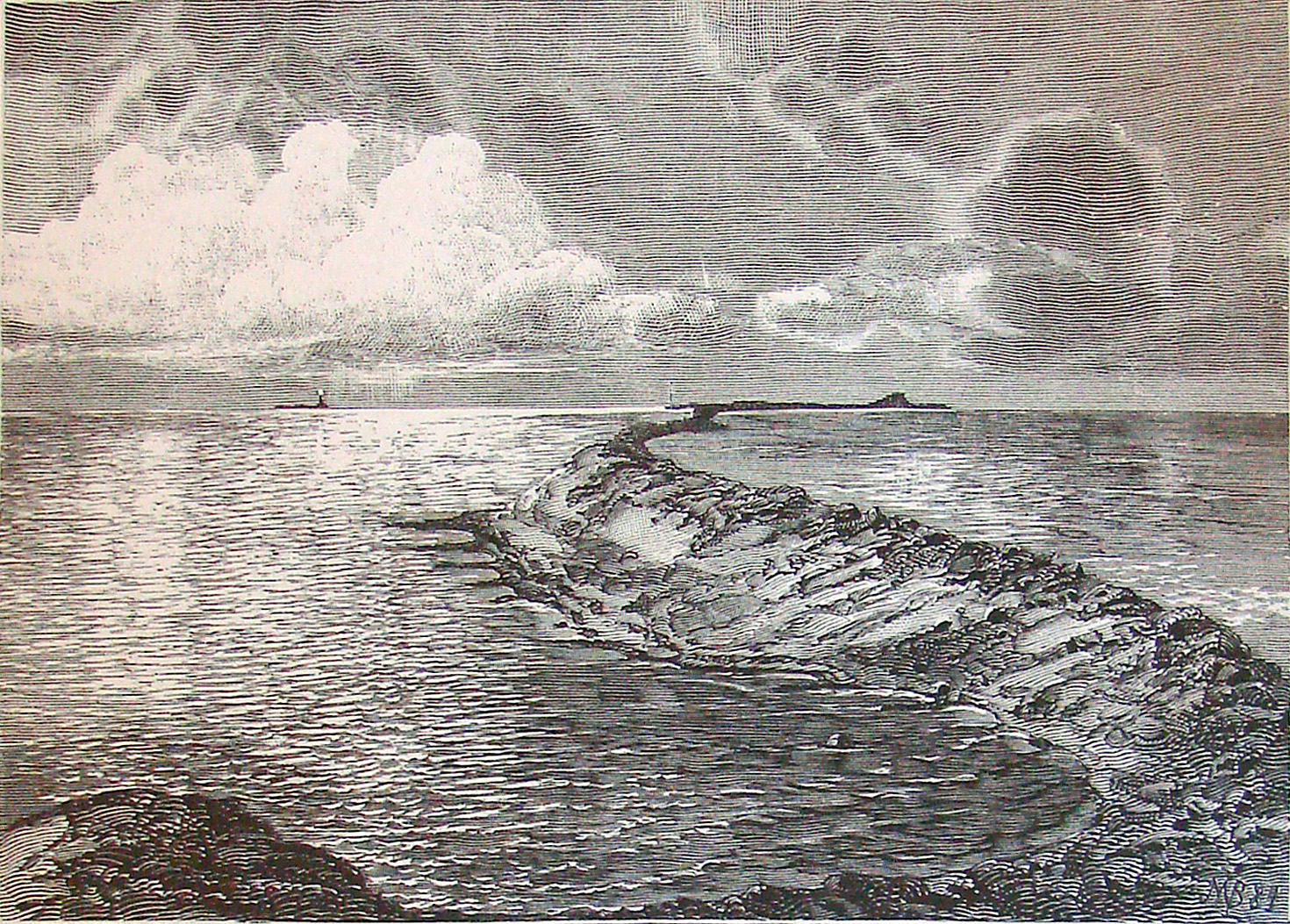 Vresen i Storebælt